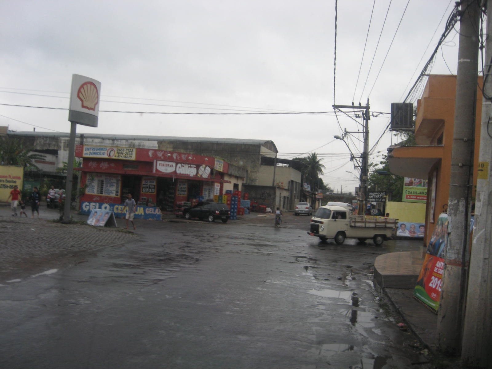 Vista do bairro Grande Rio, em São João de Meriti.